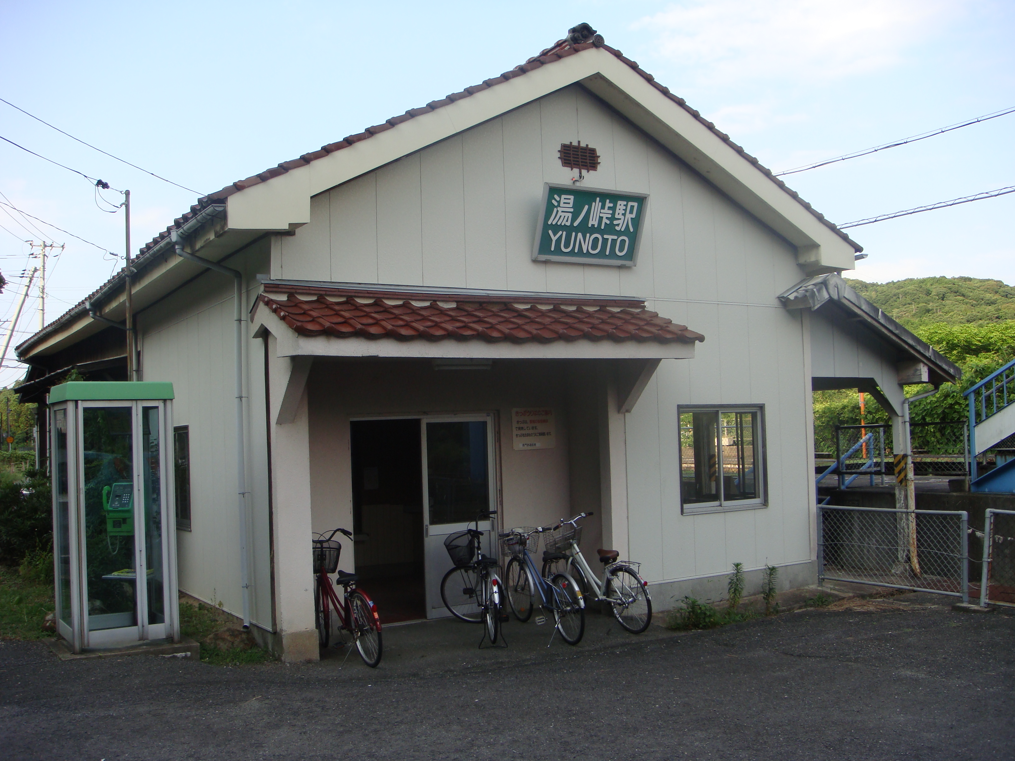 湯ノ峠駅舎(2008.07.26に投稿者が撮影)